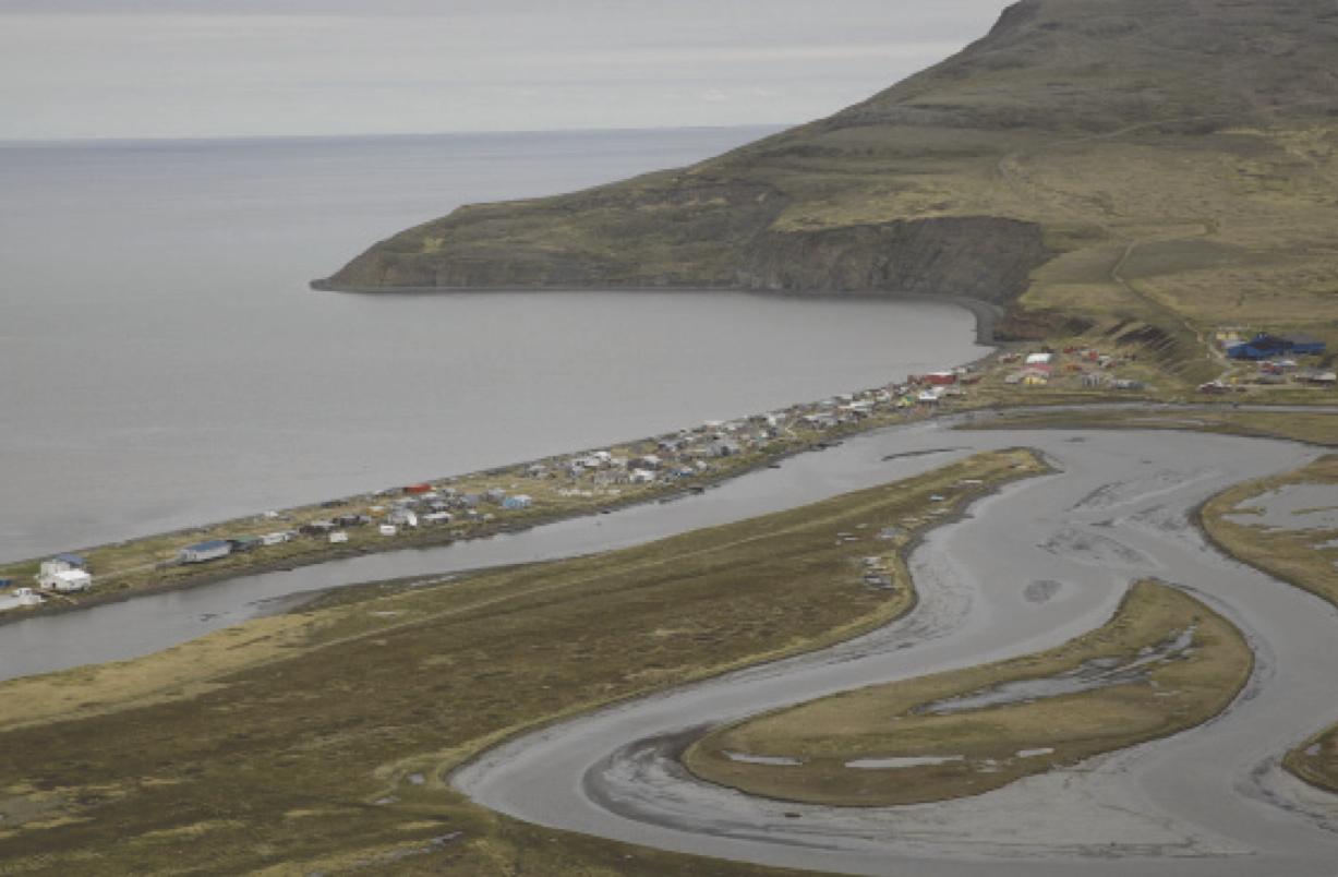 tununak1